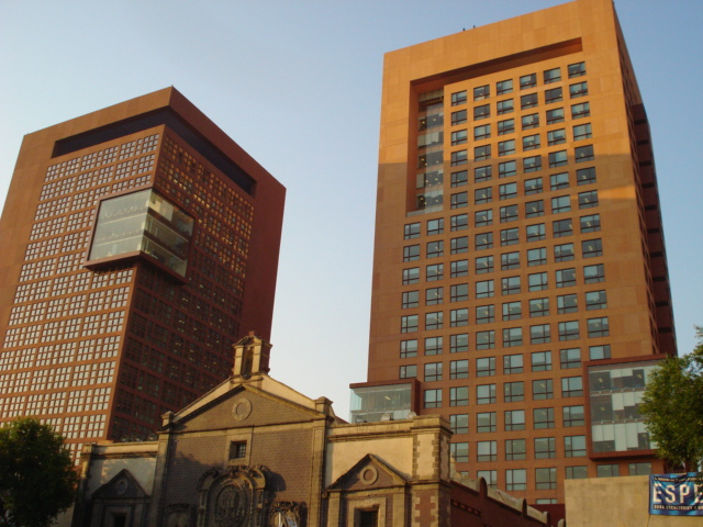 Edificio Tlatelolco, sede de la Secretaría de Relaciones Exteriores